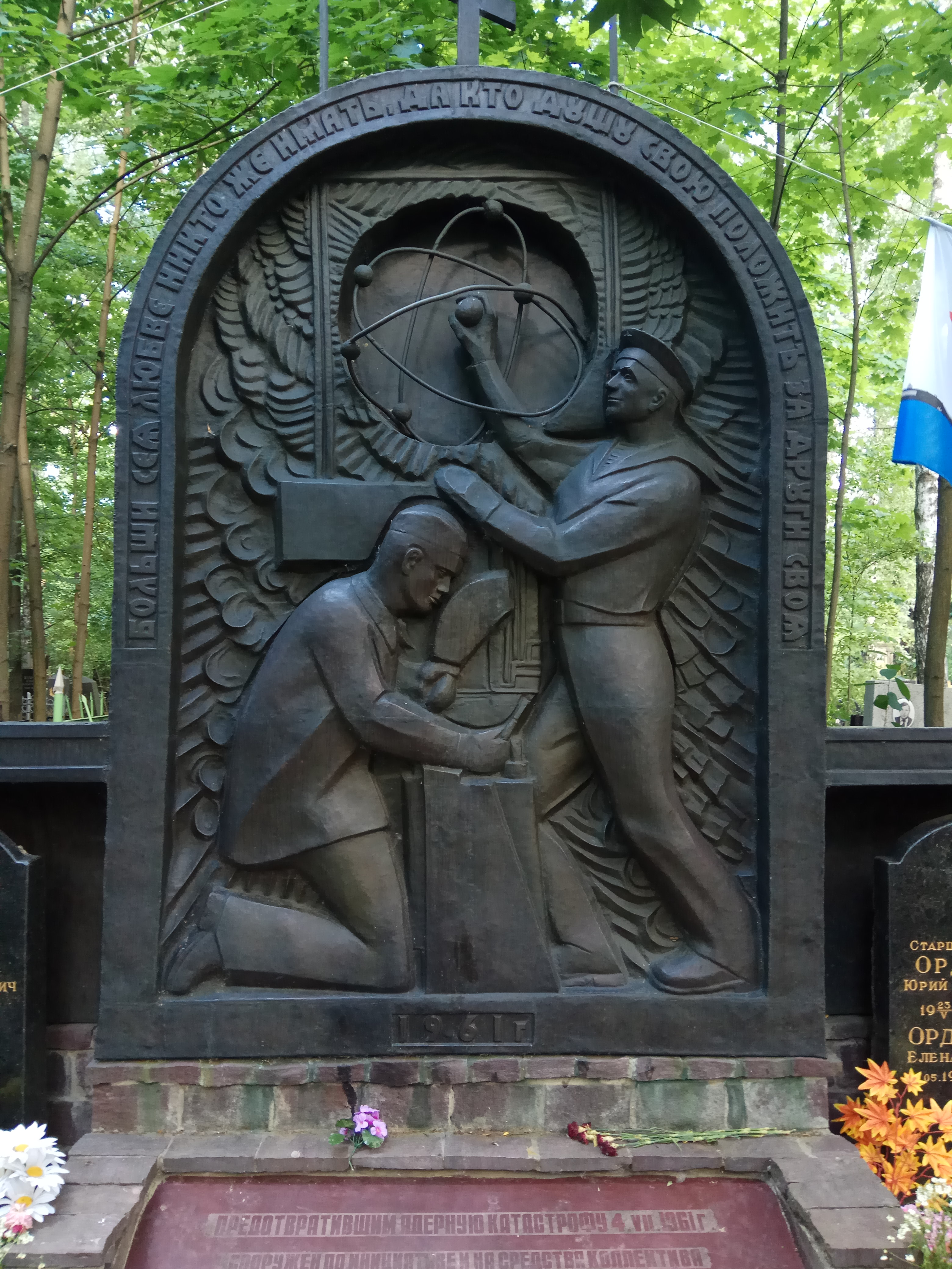 Памятник погибшим членам экипажа атомной подводной лодки К-19 на Кузьминском кладбище, Москва. Открыт 4 июля 1998 года. Авторы скульптор-монументалист Алексей Постол и архитектор Михаил Панкратов.